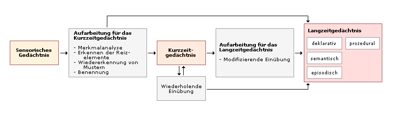 Modell des menschlichen Gedächtnisses Creative-Commons Lizenz, GFDL selbst erstellt (Fireworks MX) Erstellungdatum: 27.9.2004 Erstellt von: Thomas G. Graf Vorlage: nach :abenteuer psyche (Gabriele Amann, Rudolf Wippinger), 1. Auflage, Abbildung 3.16 Mögliche Lizenzierungen